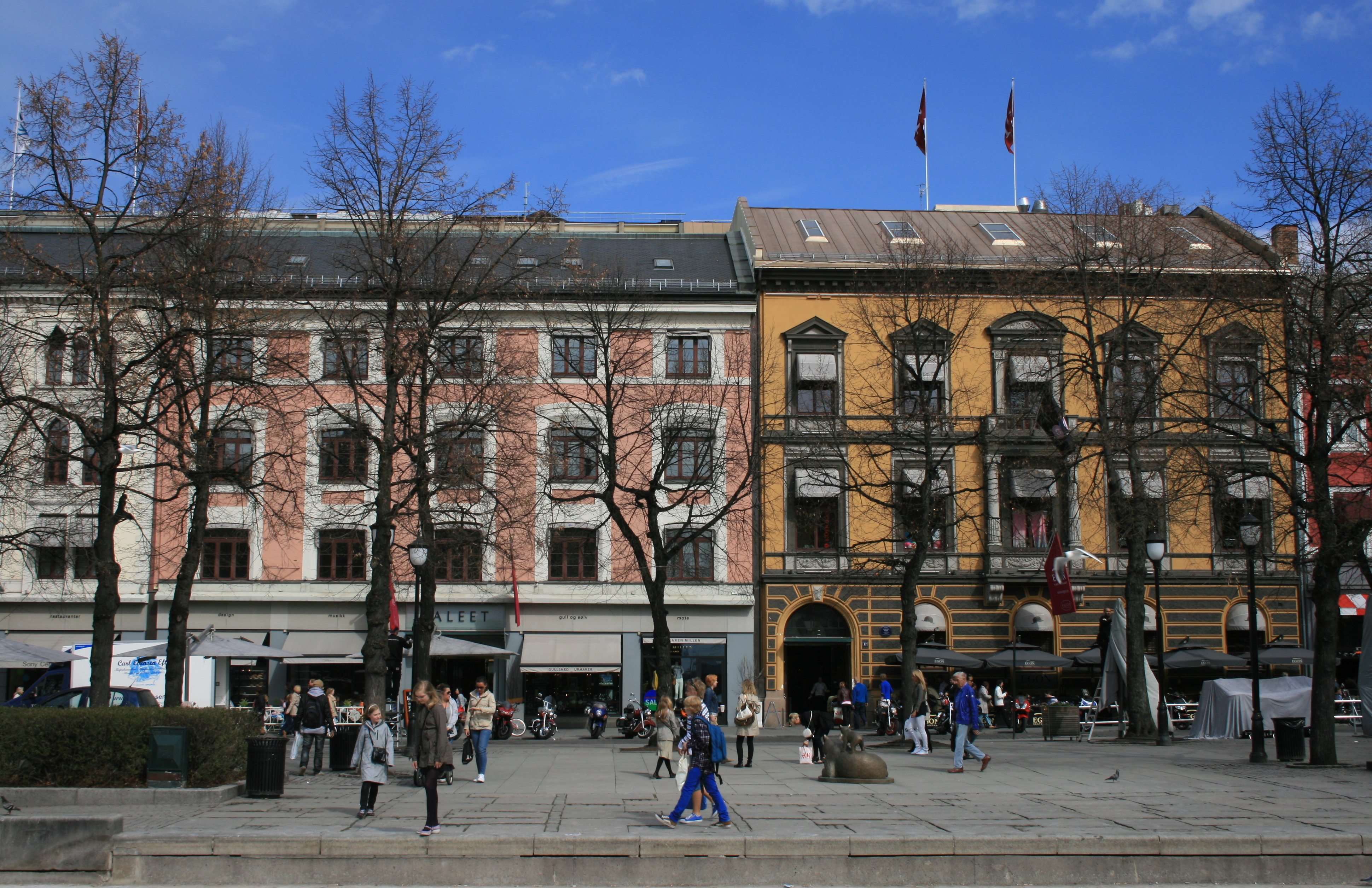 Paleet shoppingsenter på Karl Johans gate i Oslo sett fra Spikersuppa.